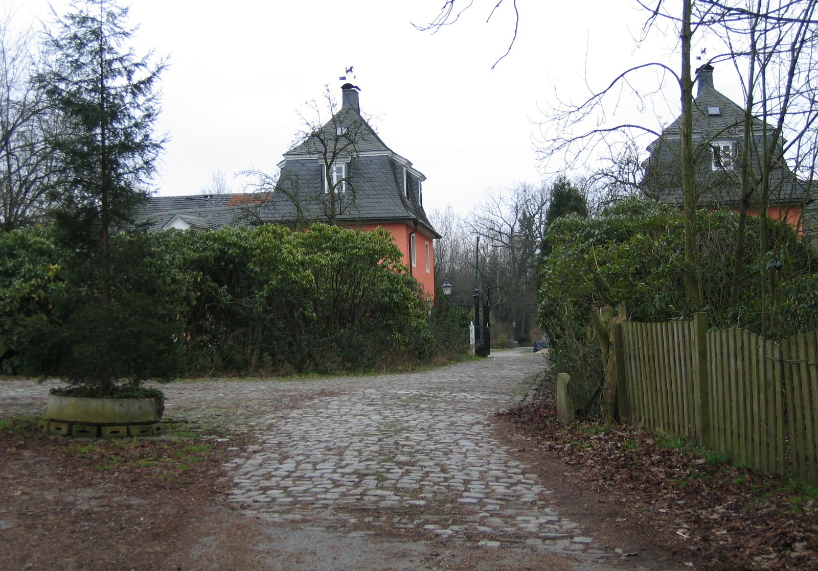 Restaurierter Eingangsbereich Haus Füchten (Privatbesitz) im Ortsteil Hünningen der Gemeinde Ense